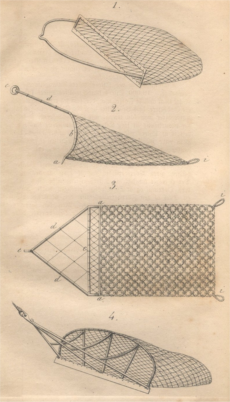 Austerngeschirr